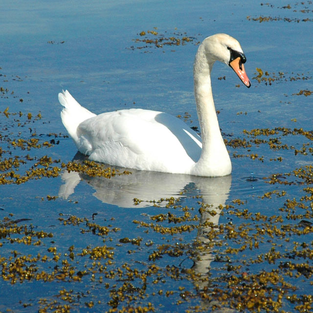 swanDSC_1479